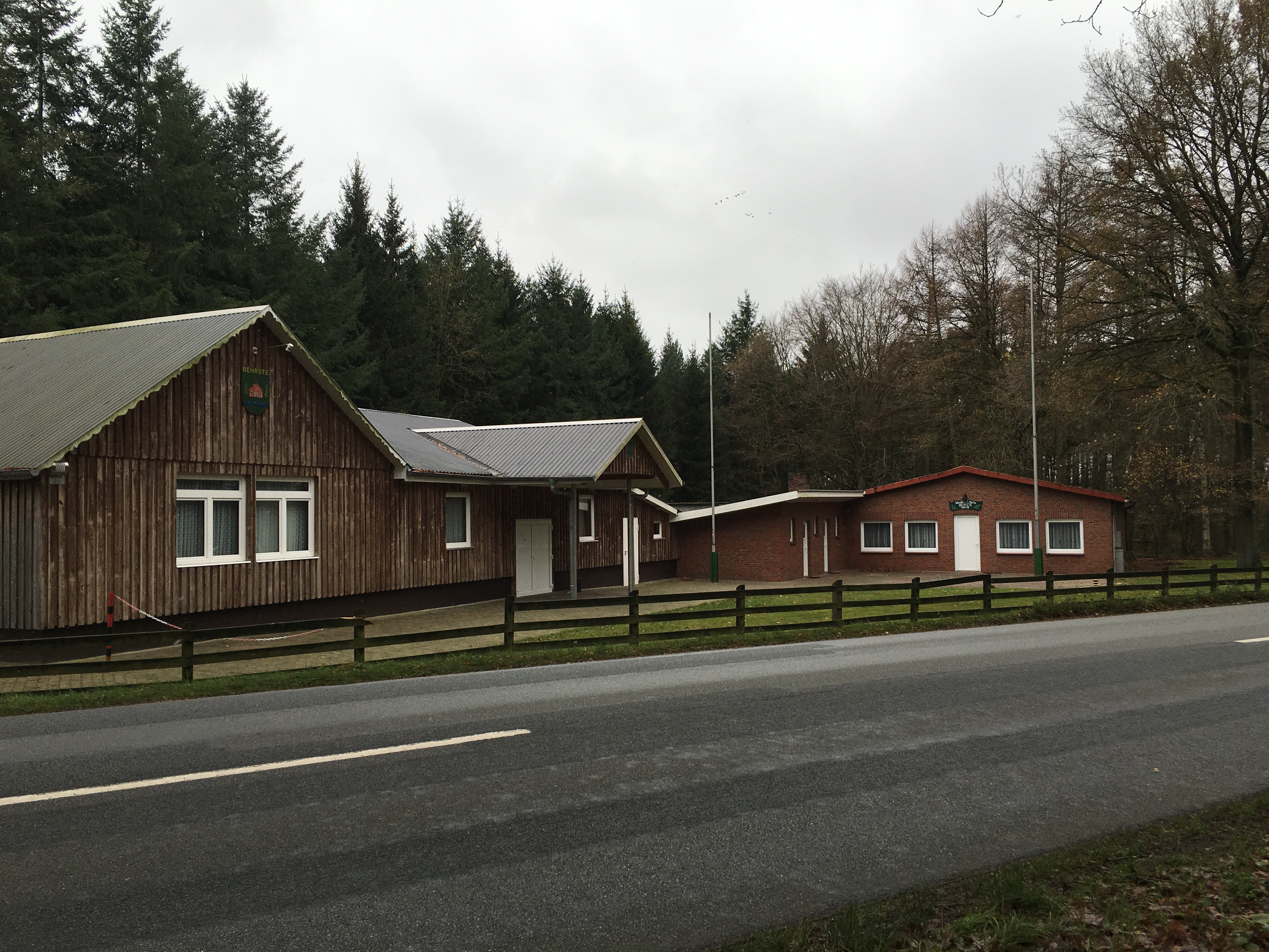 Schüttenhuus in Beeß